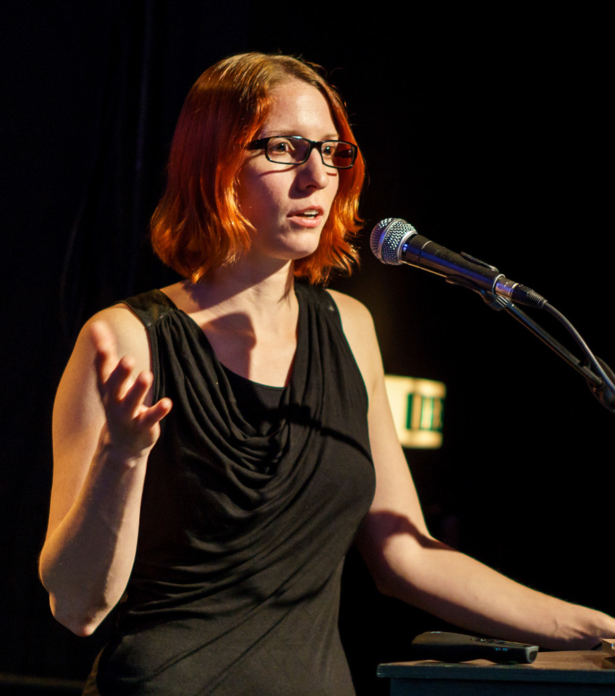 Webmontag 62, 14. Juli 2014 Foto